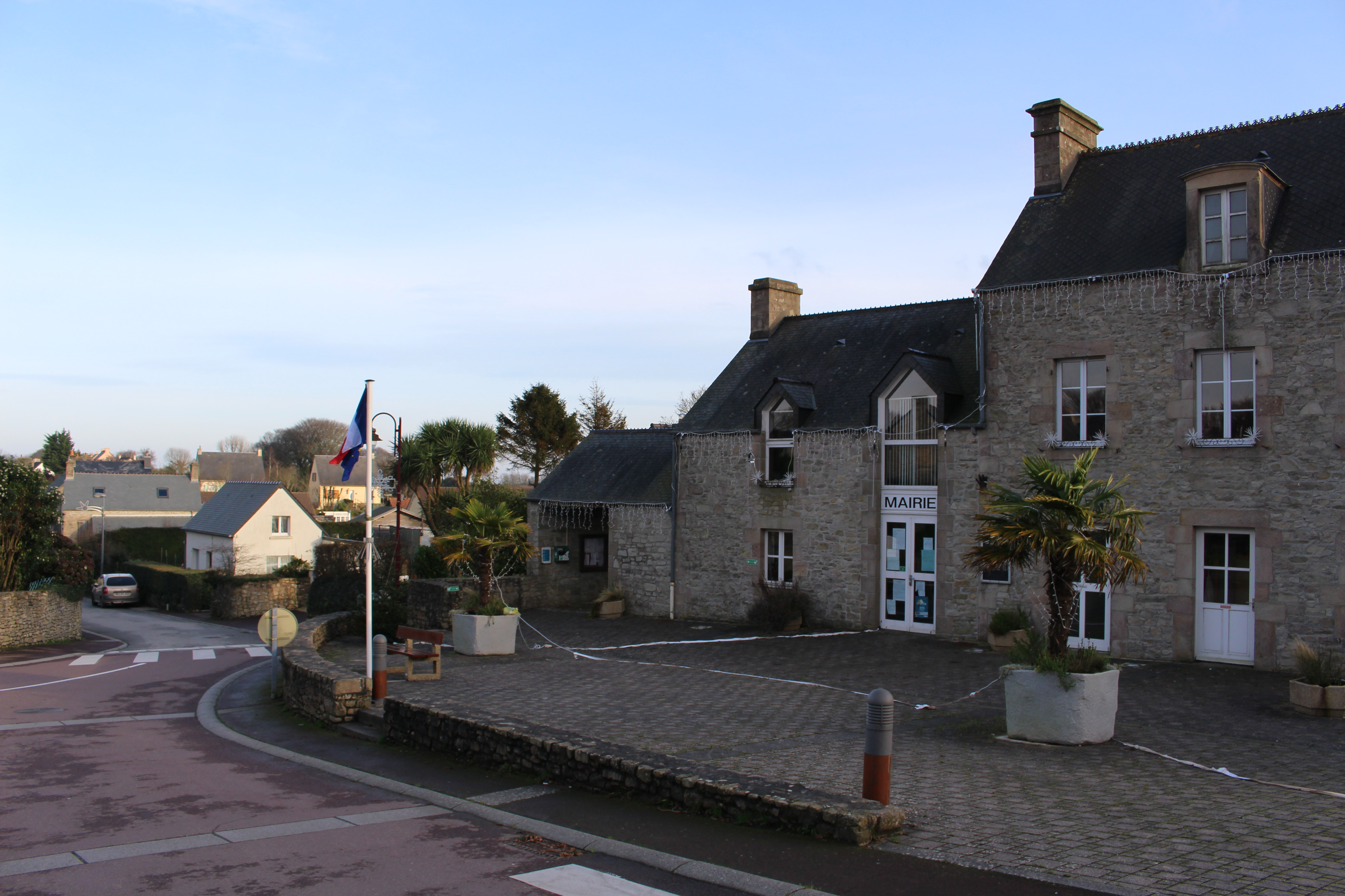 Sainte-Croix-Hague, Manche